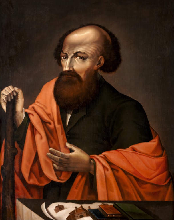 Portrait of Nikita Demidov (1656-1725)